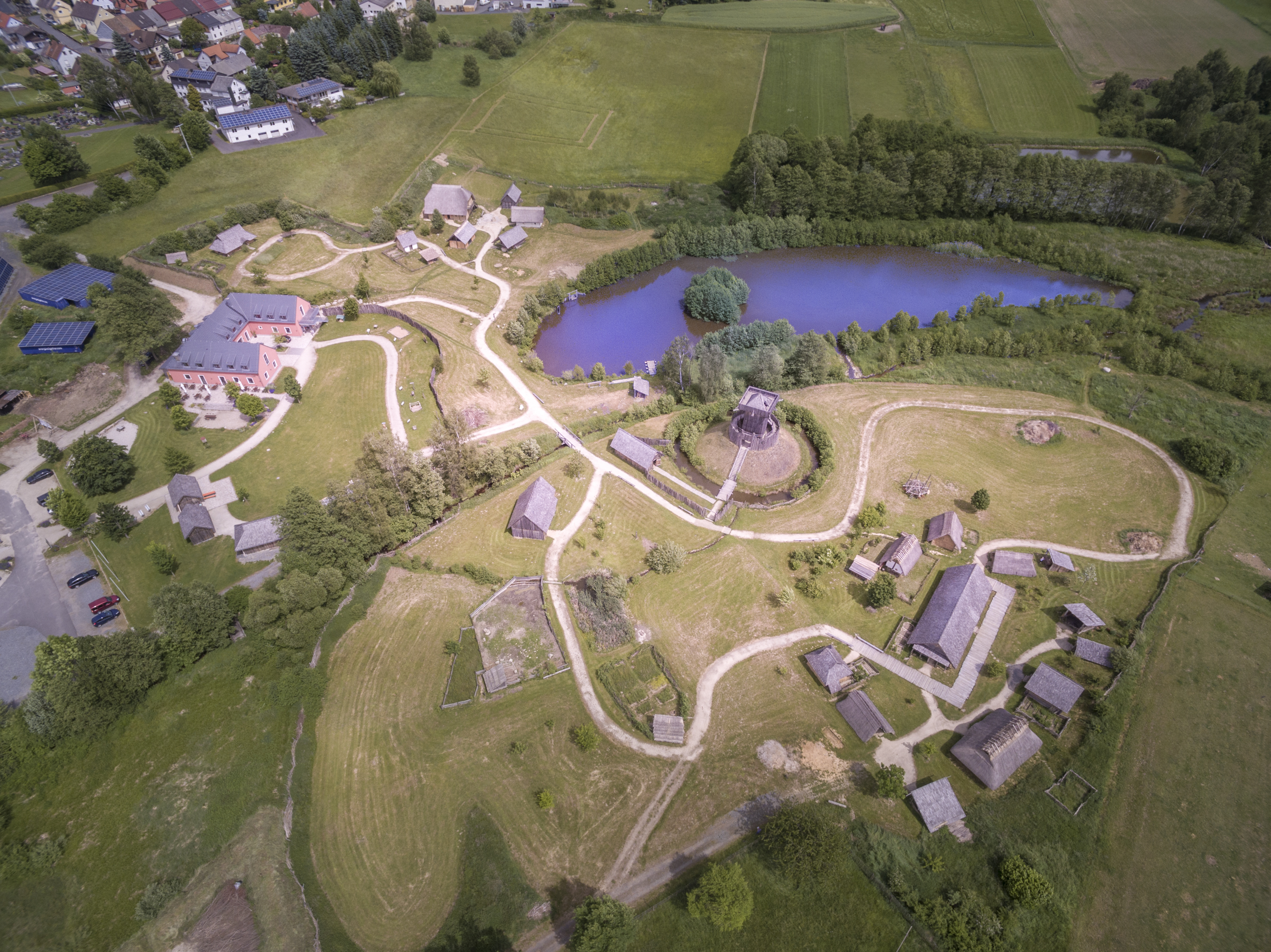 Historický park prezentuje tři časová období - 8. - 9. století, 11. století a století 13.